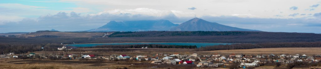 Панорама Этоко